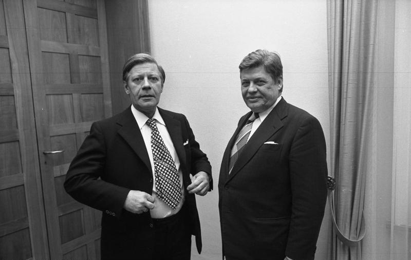 Bundeskanzler Helmut Schmidt empfängt Arbeitgeberpräsident Hanns Martin Schleyer